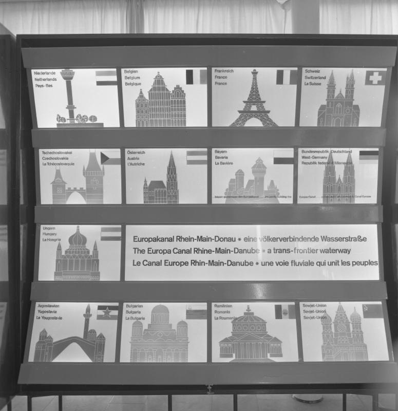 Ausstellung der Rhein-Main-Donau-AG Landesvertretung Bayern, Bonn